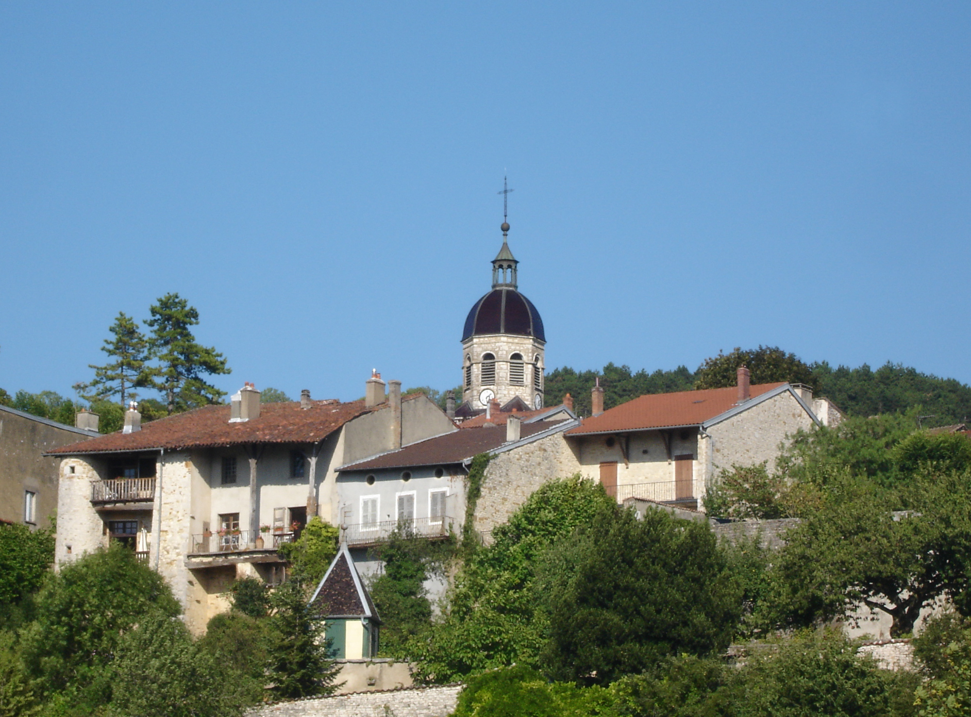 Vue générale du village de Treffort-Cuisiat dans l'Ain